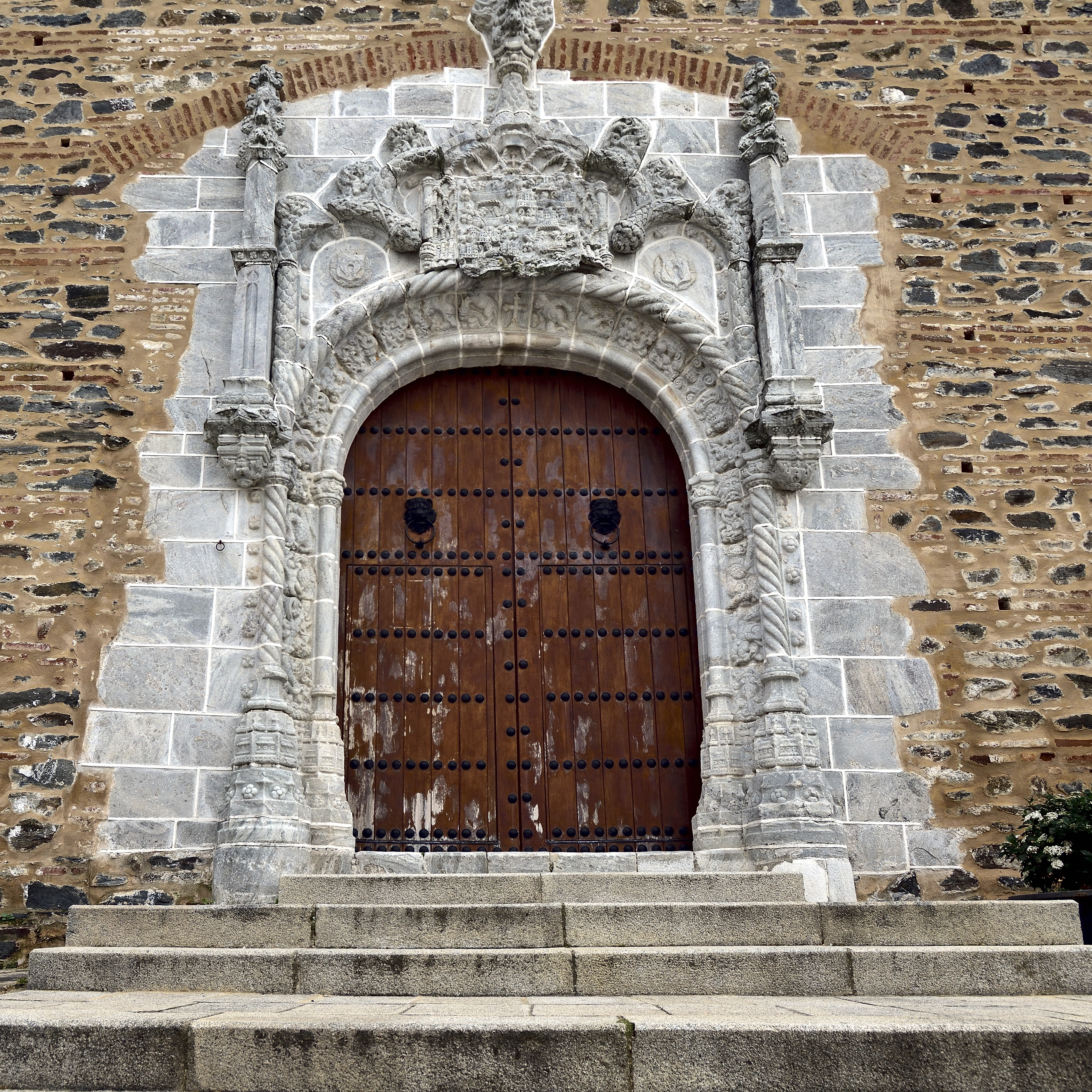 Portada principal: Se observa el arco conopial, los baquetones, los pináculos, arco principal, etc.